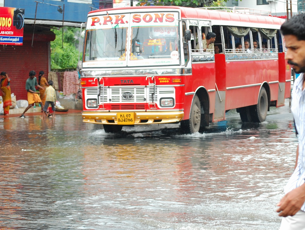 കൊച്ചിയിൽ നല്ല രണ്ടു മഴ പെയ്താൽ പിന്നെ റോഡെല്ലാം പുഴയാകുന്ന ദൃശ്യം